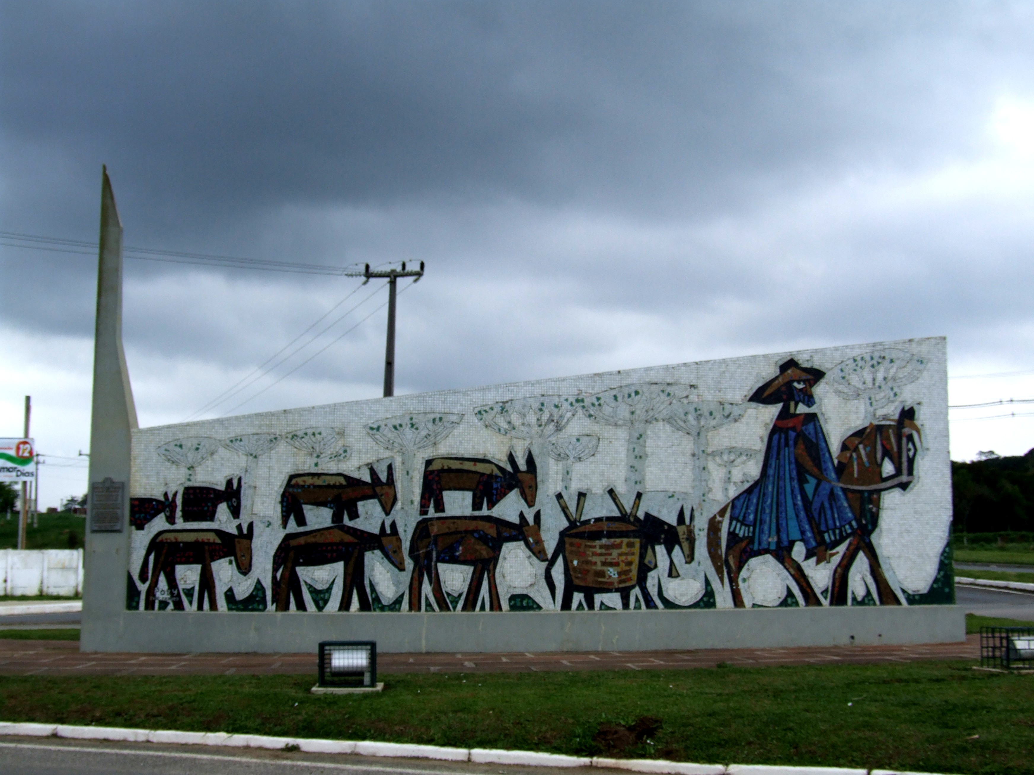 "Monumento aos Tropeiros" (by Poty Lazzaroto) in Lapa, Paraná, Brazil.